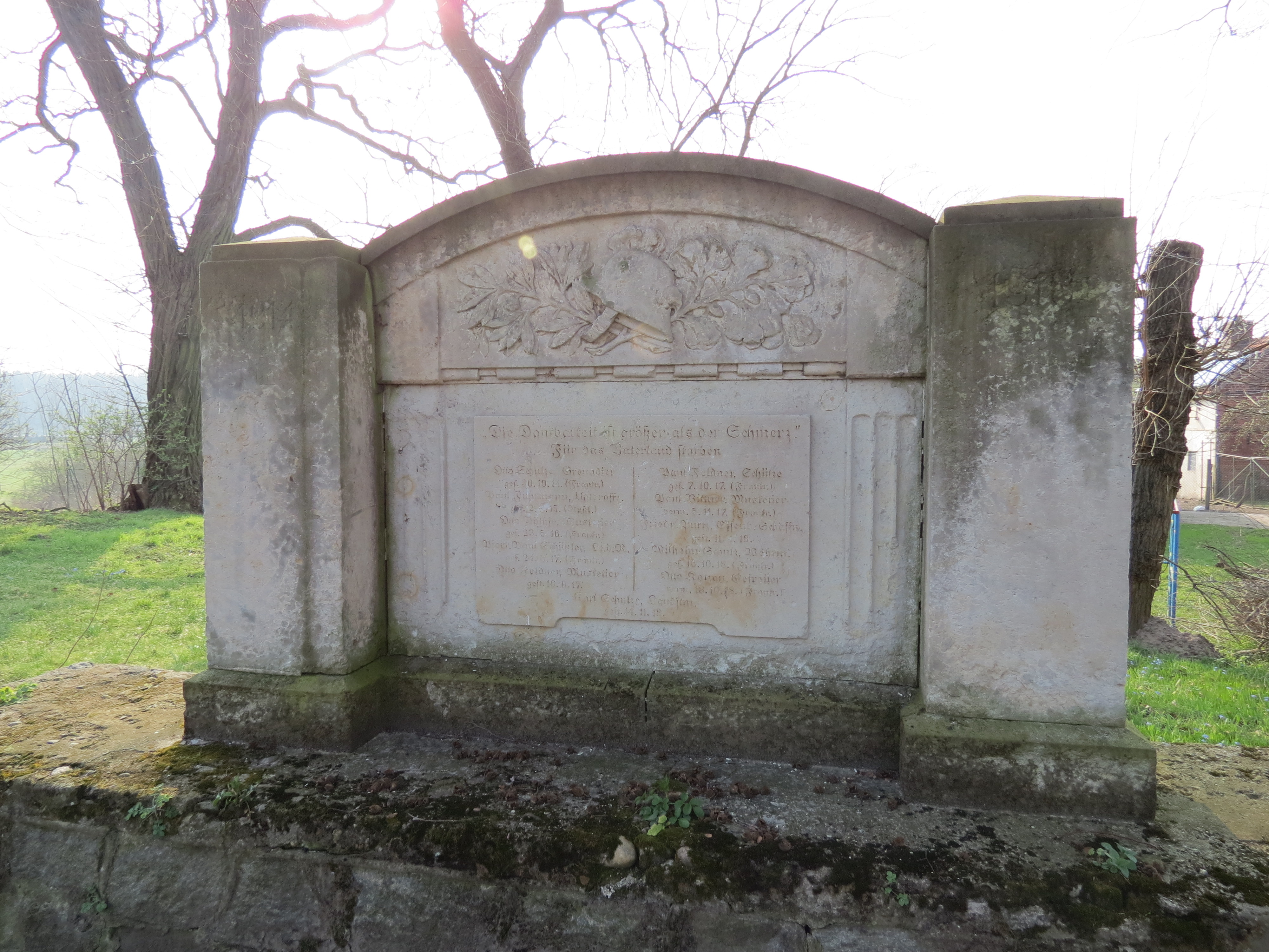 Kriegerdenkmal, Trebitz, Ortsteil der Stadt Lieberose, Lkr. Dahme-Spreewald, Brandenburg, Deutschland